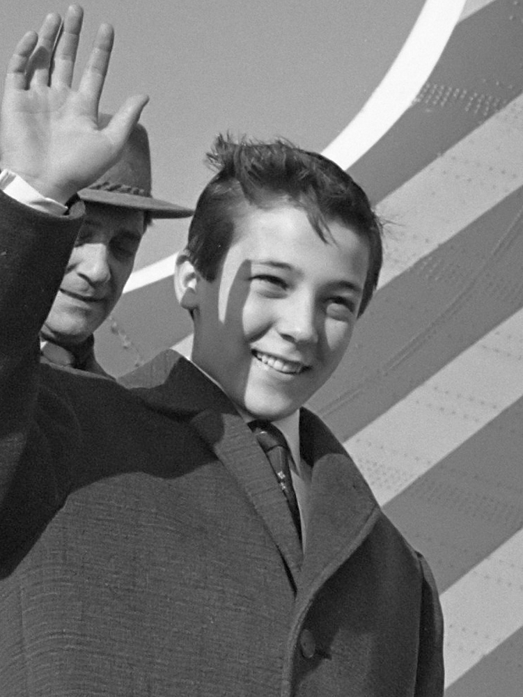 Aankomst 15-jarige zanger Robertino op Schiphol 5 december 1961